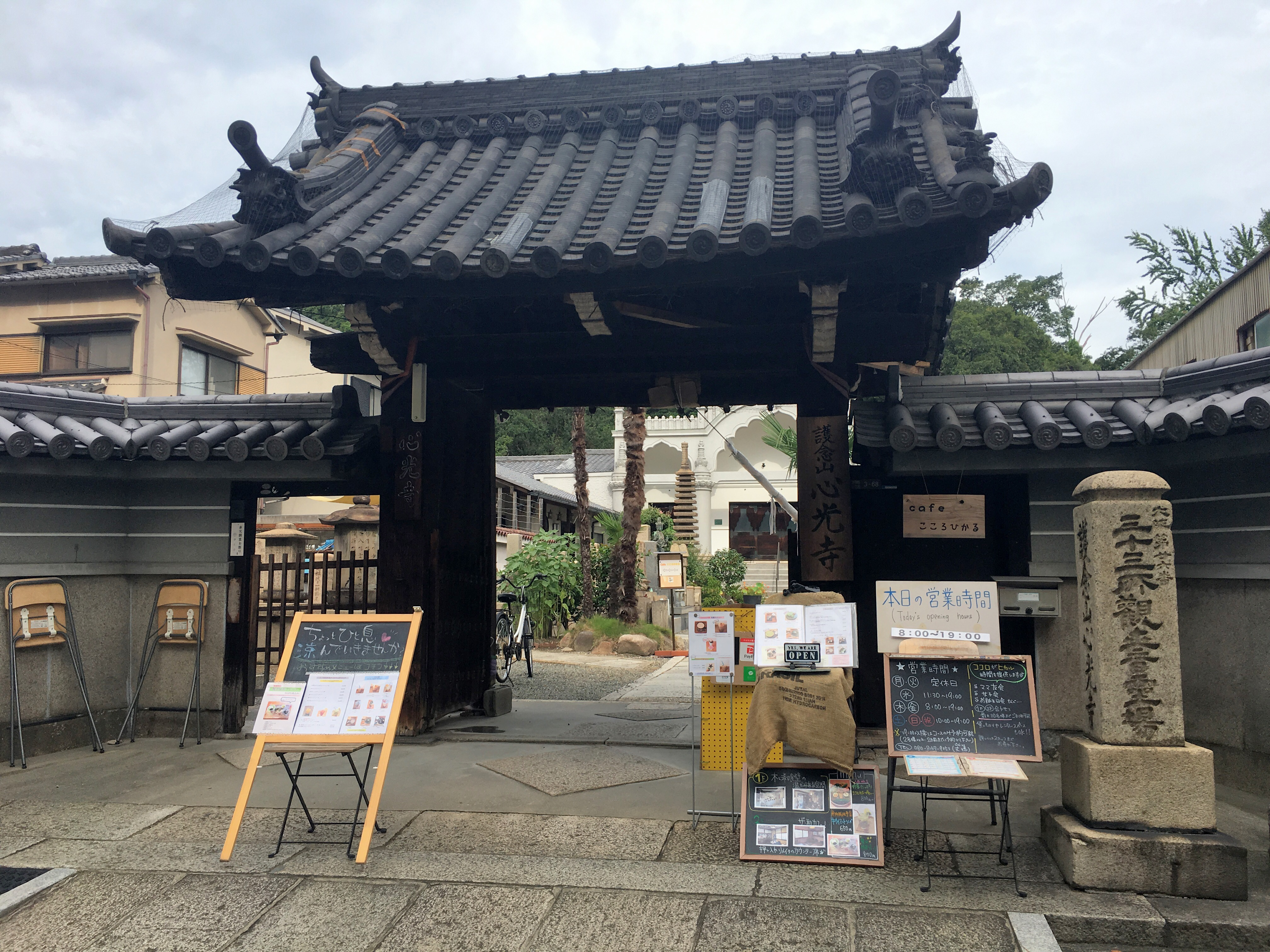 2019年8月22日、心光寺で撮影。